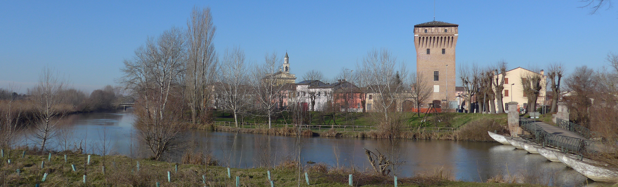 Commessaggio, panorama.